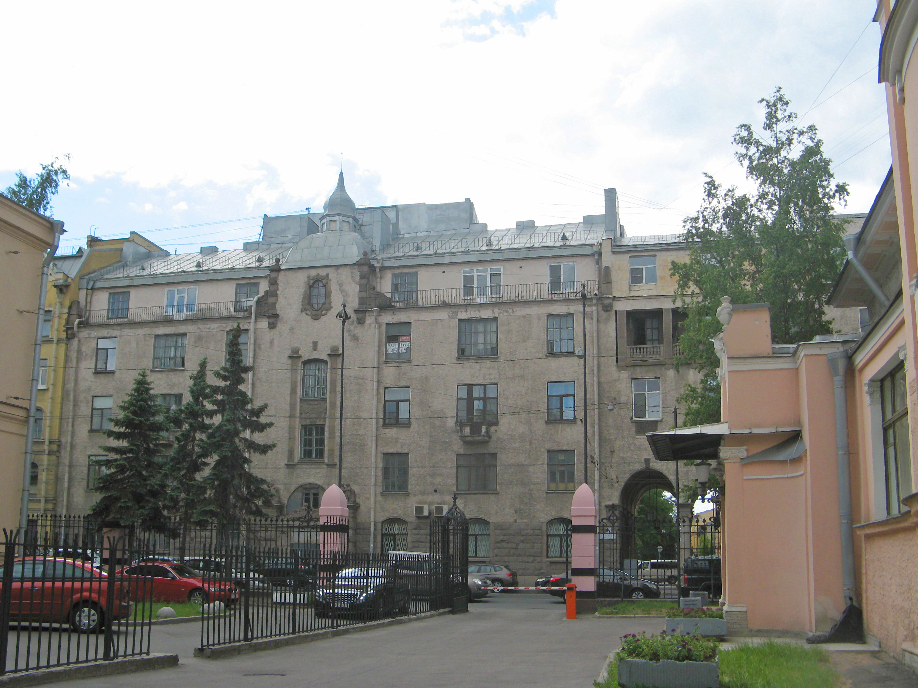 Домовладение М.Л. Олейниковой (Э.Л. Нобеля): проспект Лесной, 21, Калининский район, Санкт-Петербург